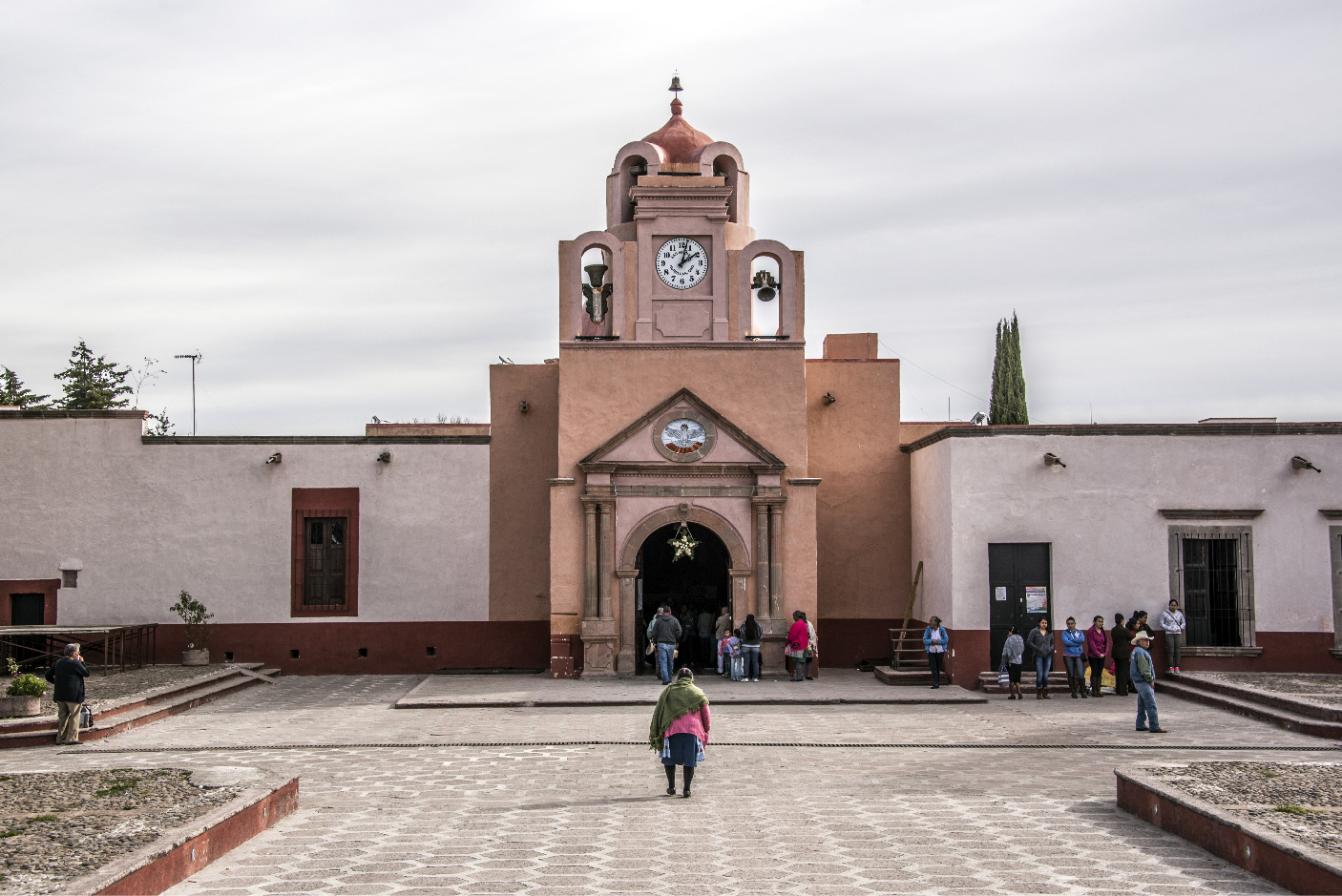 Huimilpan Pueblo